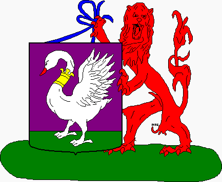 Gemeentewapen Zijpe